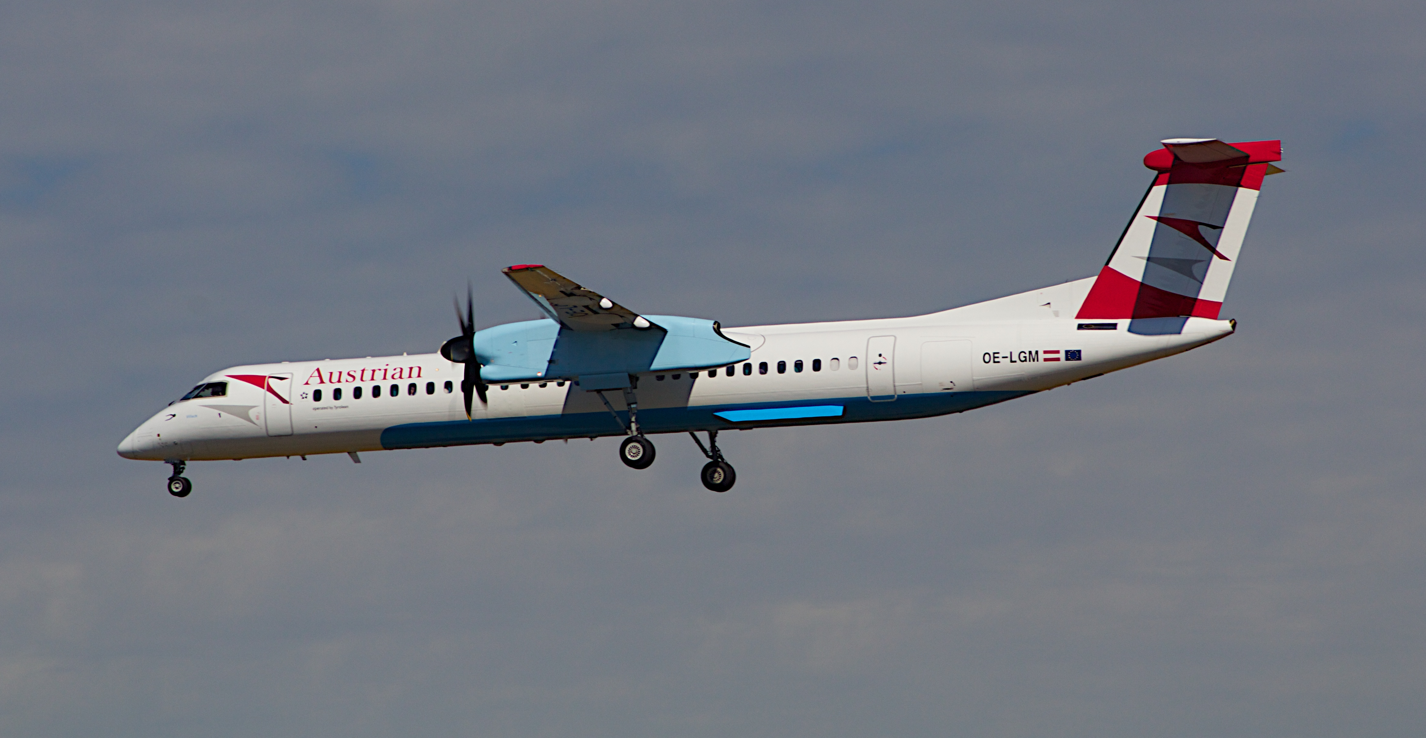 Austrian Airlines landet in Frankfurt.